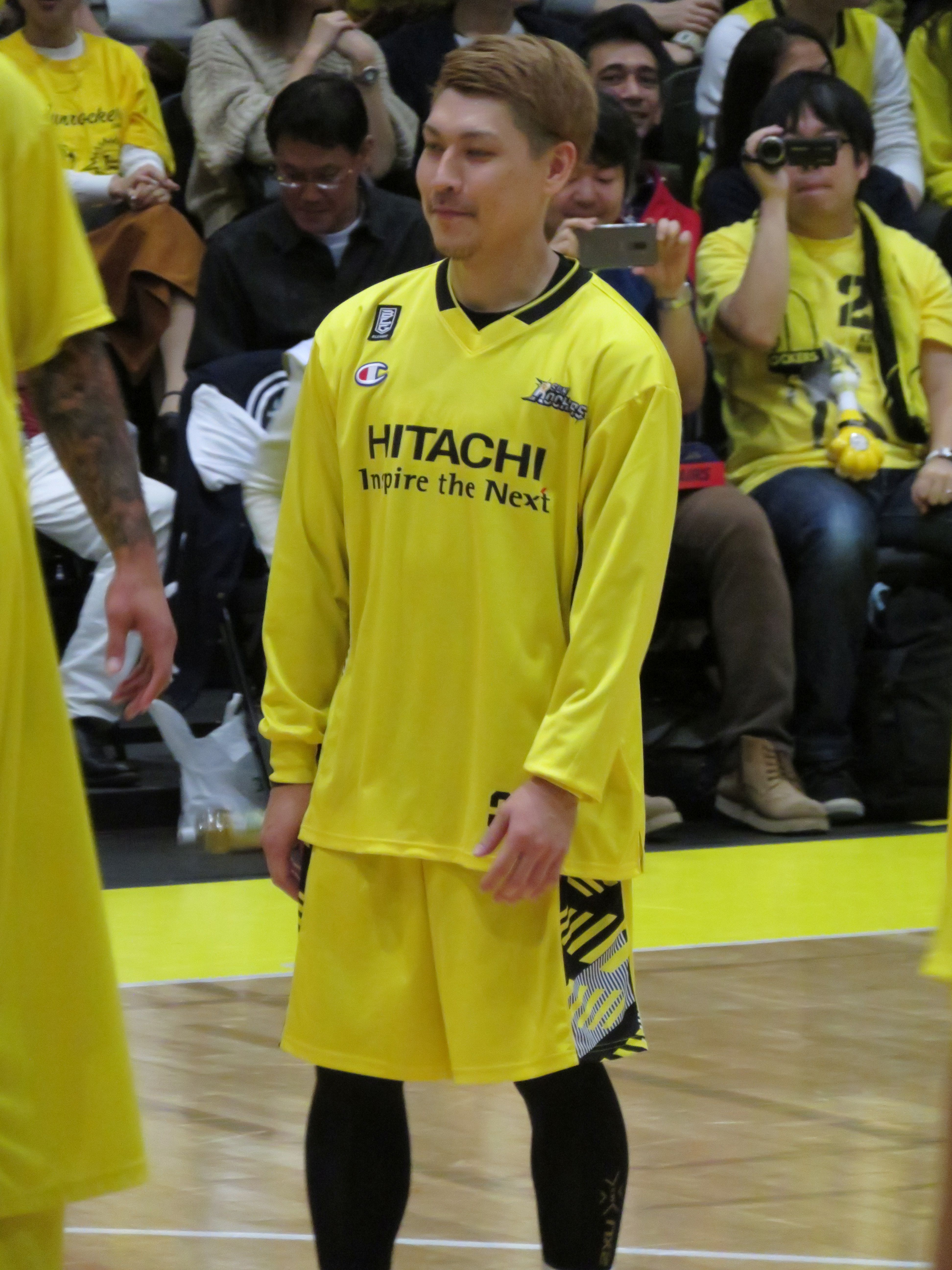 2018年10月28日撮影 2018-19 B1 第六節 渋谷-横浜 青山学院記念館